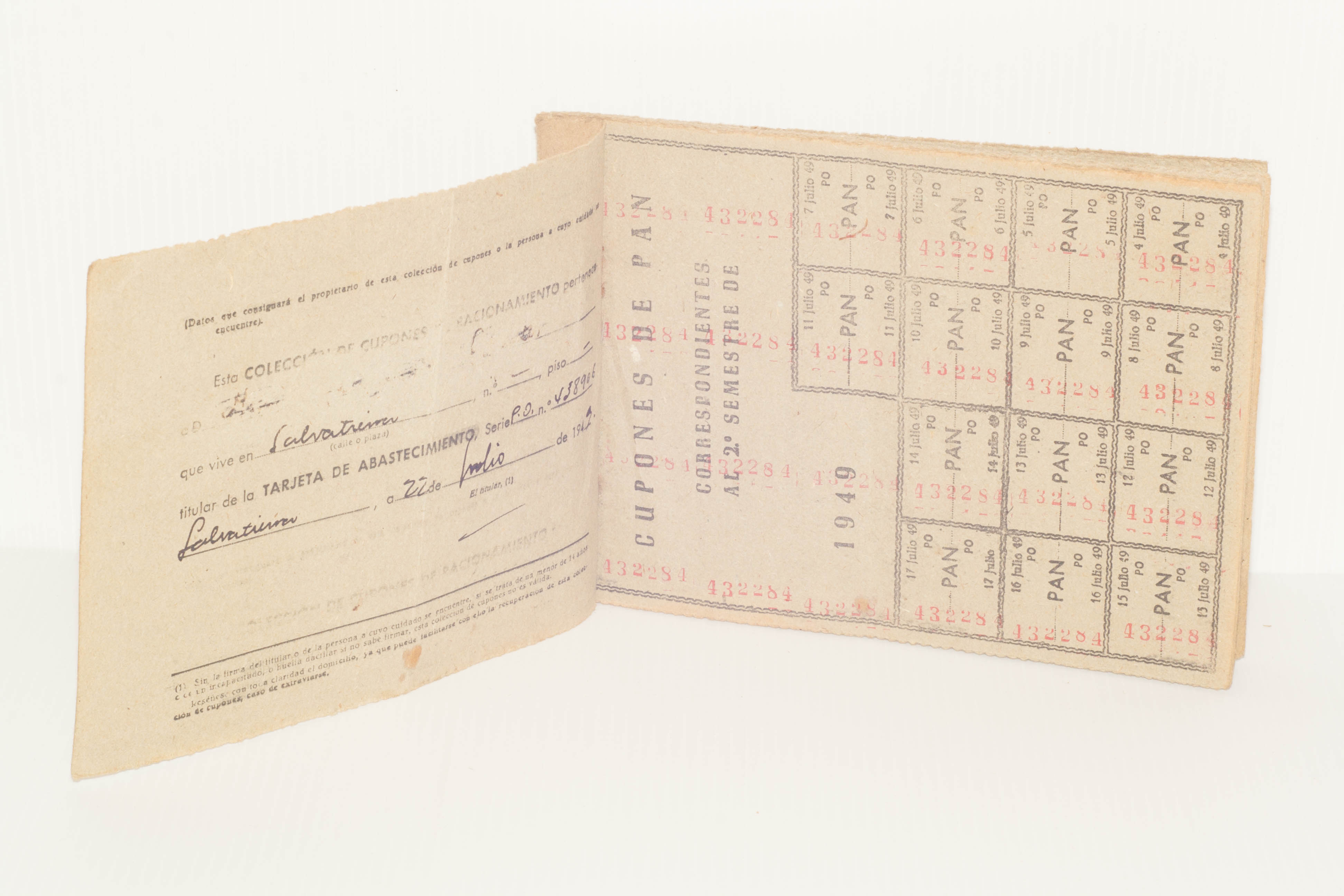 Tarjeta de abastecimiento, 1949